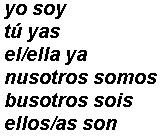 Formas d'o present d'endicatibo d'o berbo "ser", en a balle de Bio, á finals d'o sieglo XX e prenzipios d'o XXI. d'Alcuerdo con as normas ortograficas de Uesca de 1987.